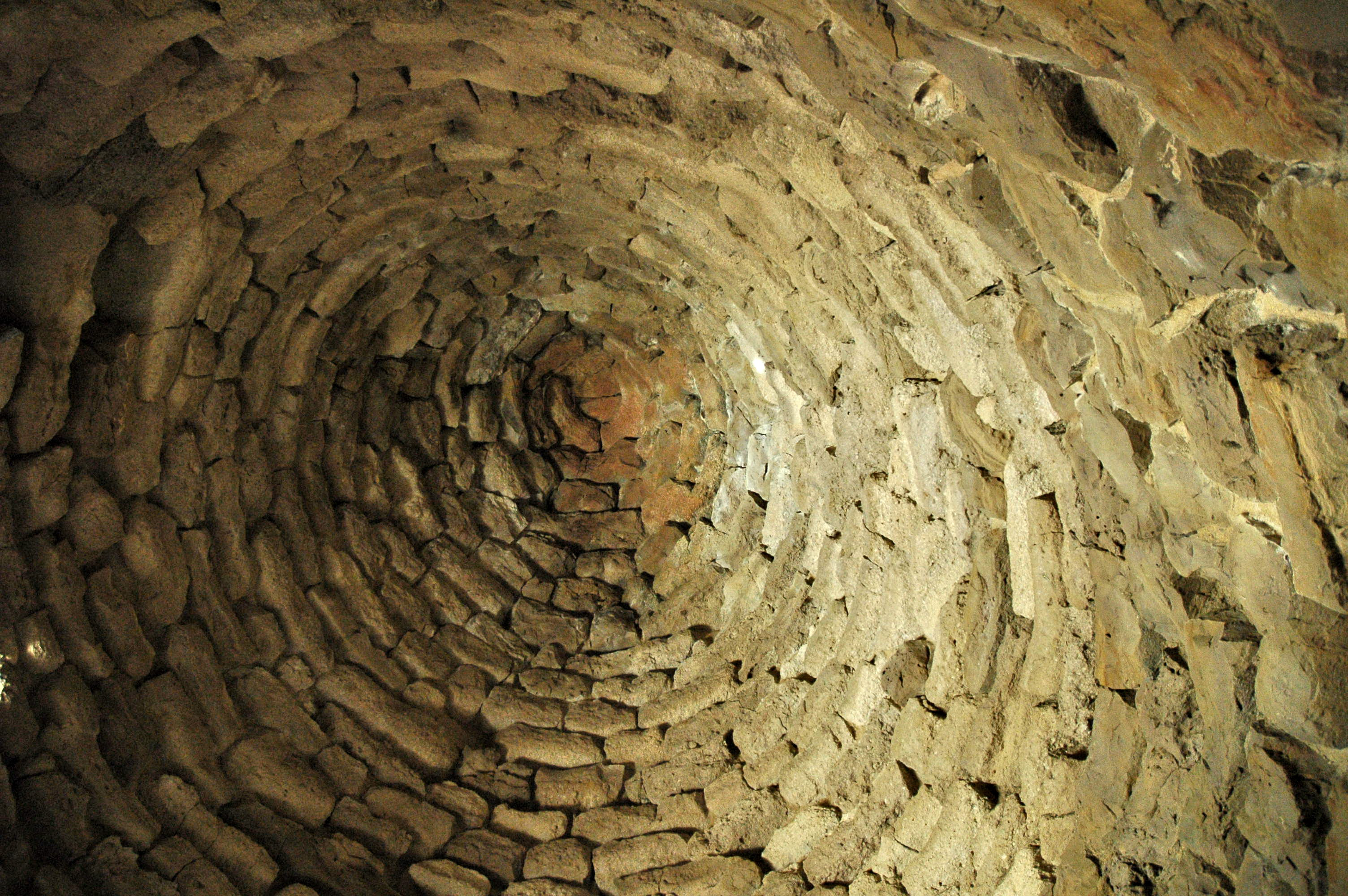 Nuraghe Is Paras - MIBAC This is a photo of a monument which is part of cultural heritage of Italy.